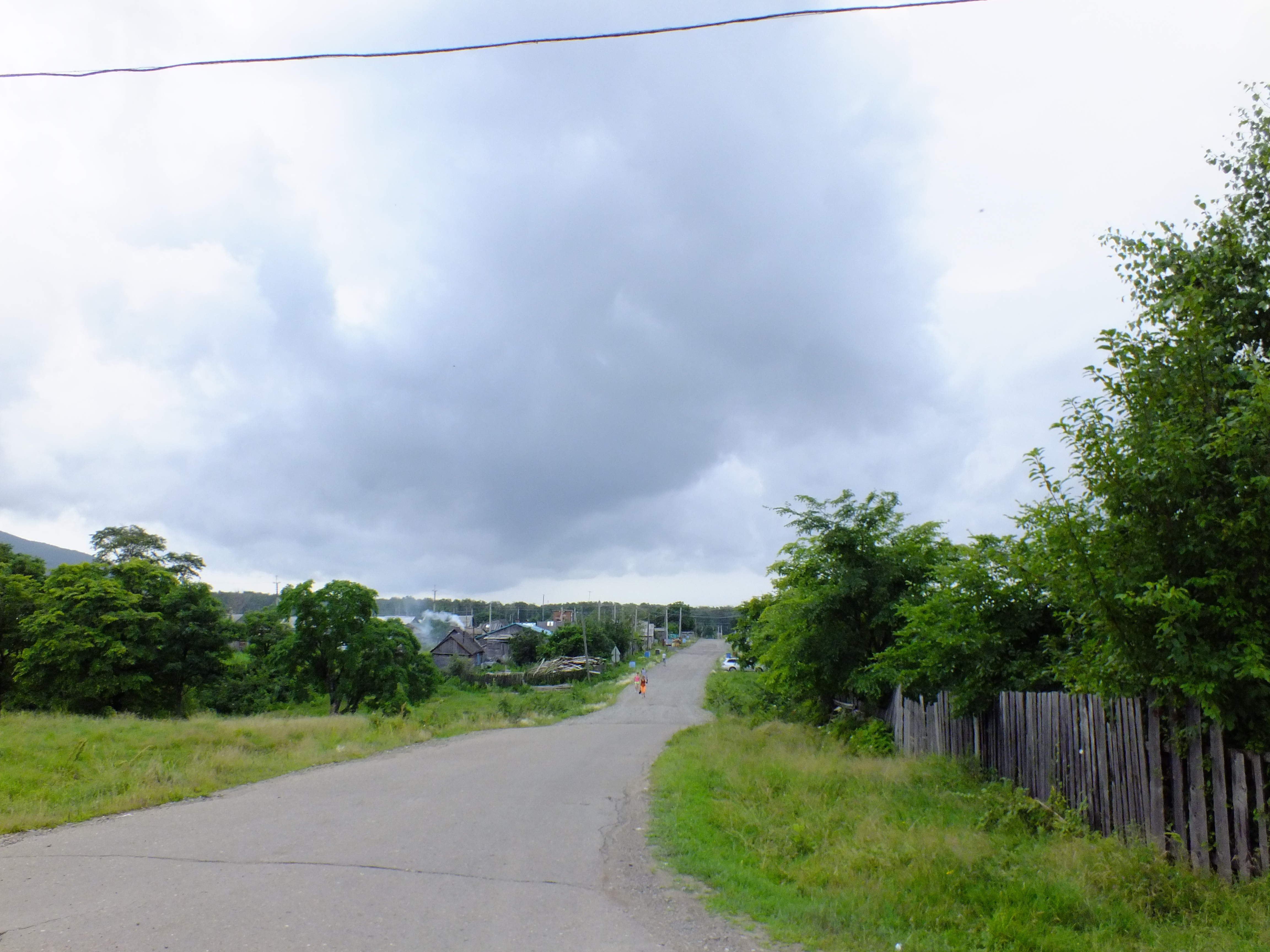 Село Лидога Нанайский район Хабаровский край